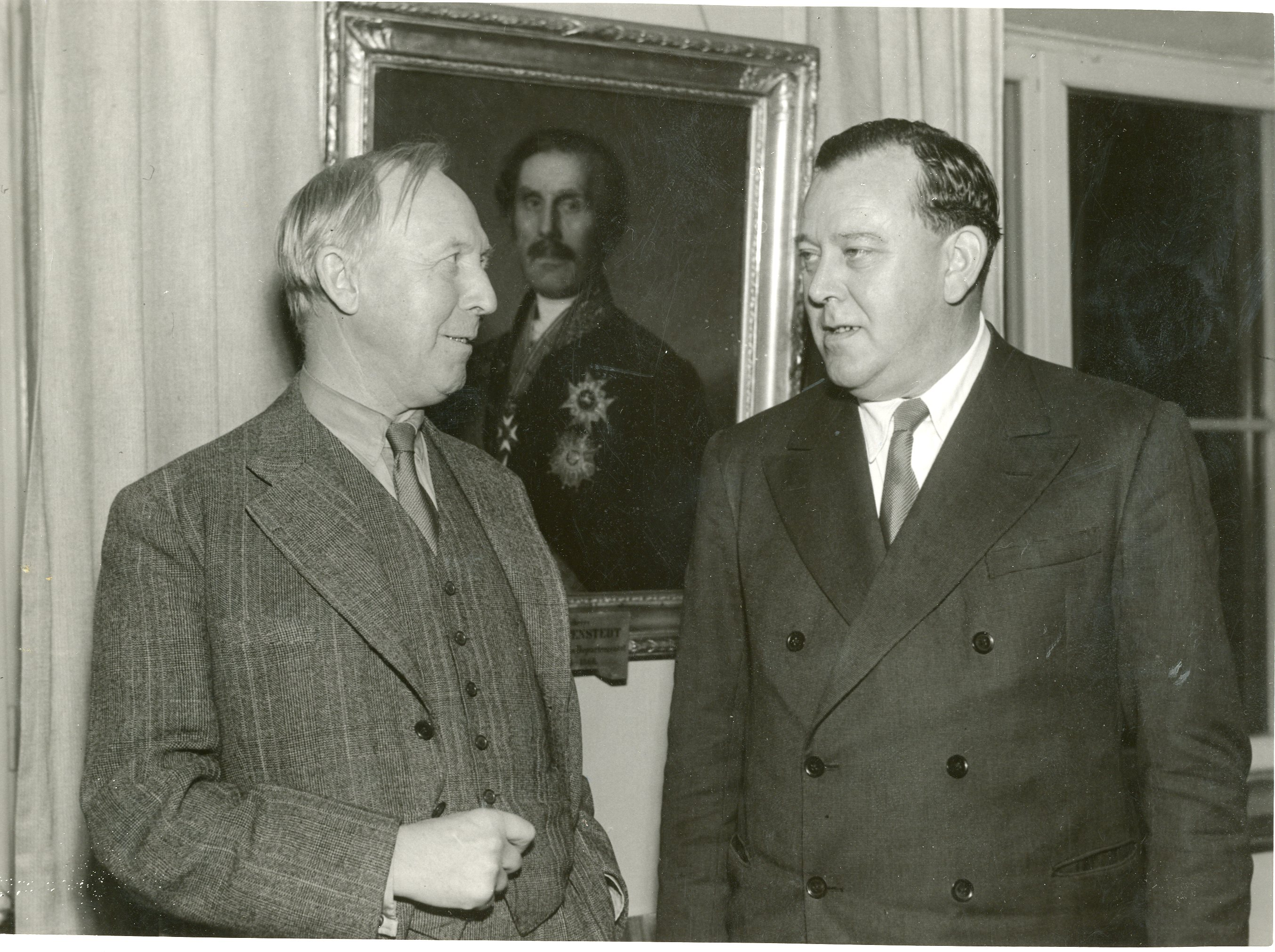 Under sitt besøk i Sverige i oktober-november 1944 arrangerte utenriksminister Trygve Lie på Grand Hotel i Stockholm en lunch, hvori deltok medlemmer av den svenske regjering, Norges og allierte nasjoners sendemenn i Sverige, fremstående norske og svenske militære sjefer o.a. Bildet viser utenriksminister Trygve Lie (t.h.) i samtale med den svenske finansminister Ernst Wigforss. Pa-1209, Serie Uc_66 Administrasjonen II